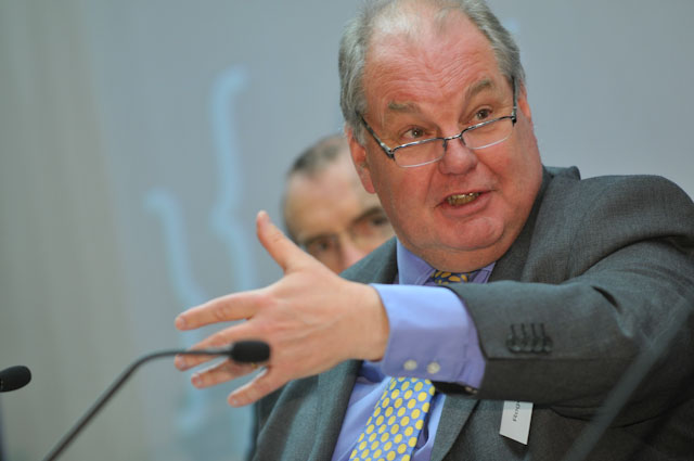 Roger Liddle (640x425 px, 60,925 bytes)